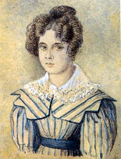 Sofia Michailovna Saltykova, moglie del poeta russo Anton Delvig (1798-1831)